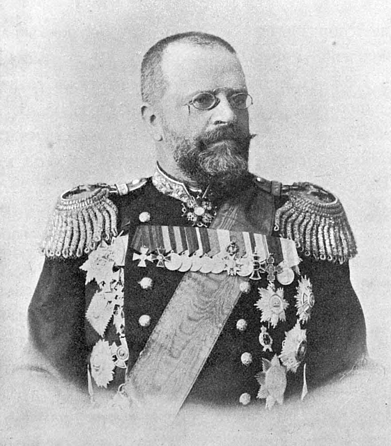 Скрыдлов, Николай Илларионович